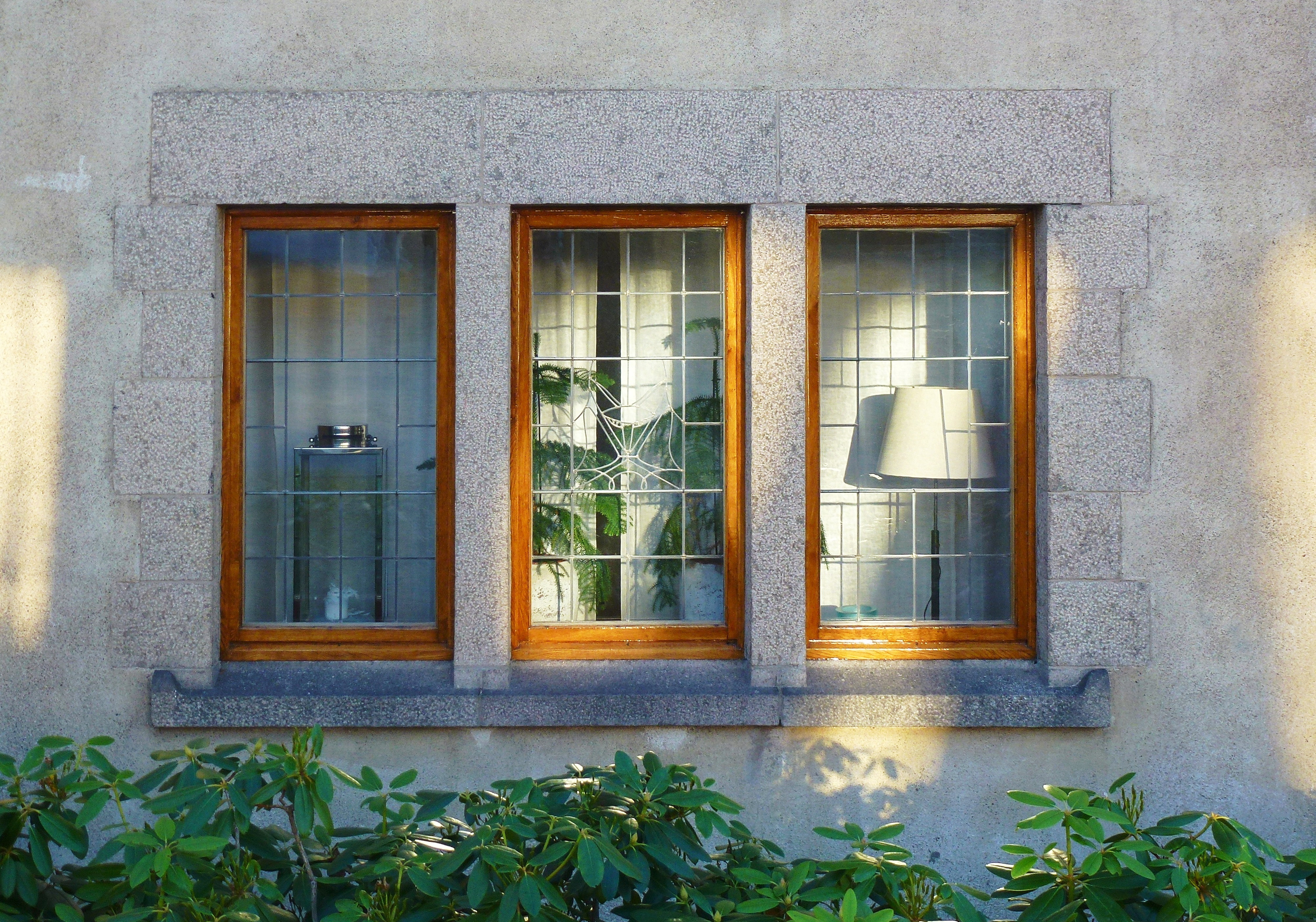 Villa Stockenberg, Fjällvägen 12A, Saltsjöbaden